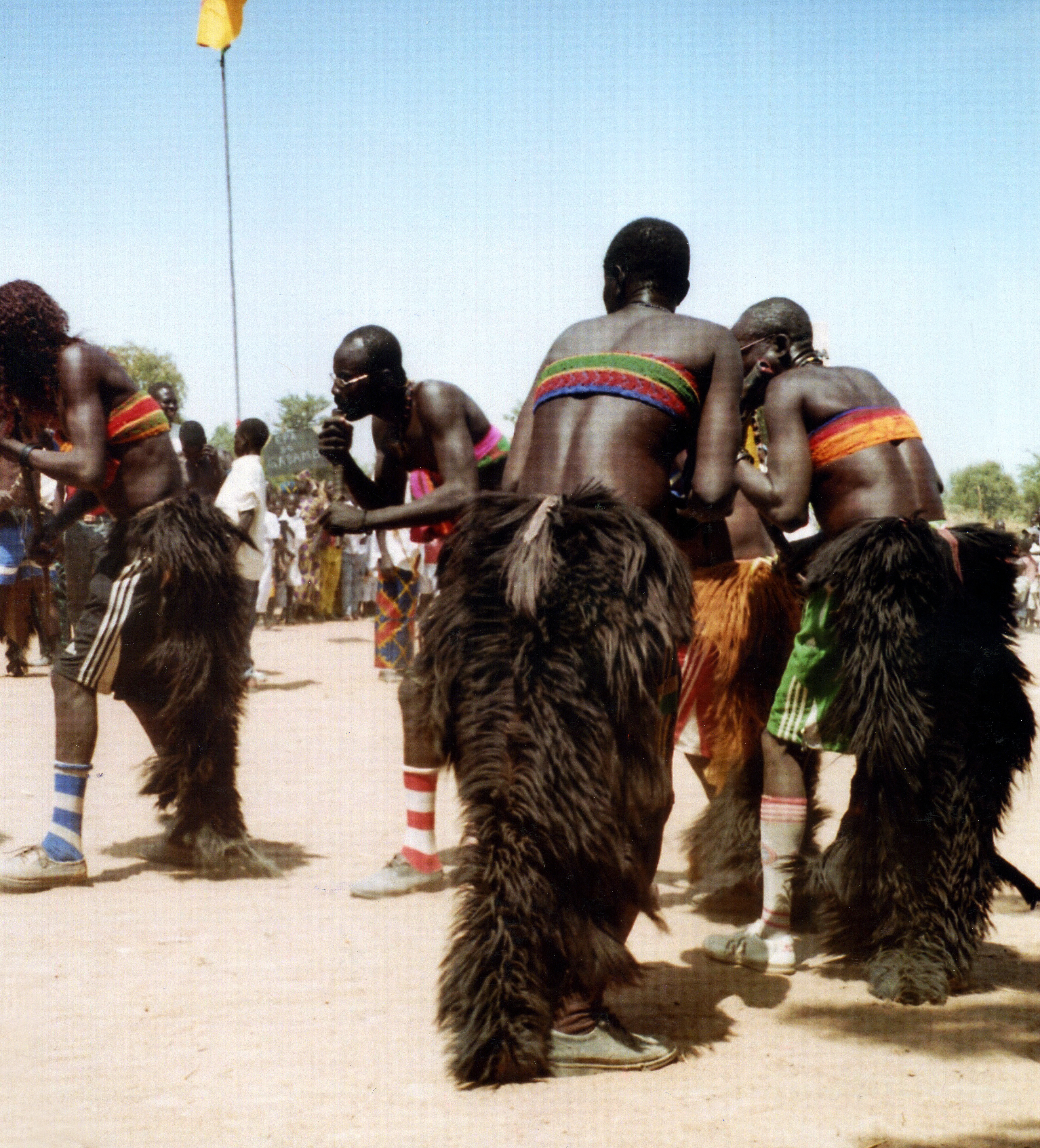 Danse traditionnelle Masa (Chad)